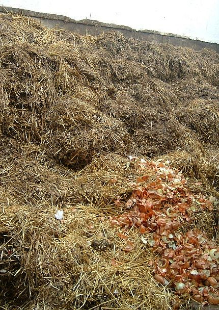 Misthaufen in einem Hinterhof in Frankfurt-Harheim (Schweinezucht).